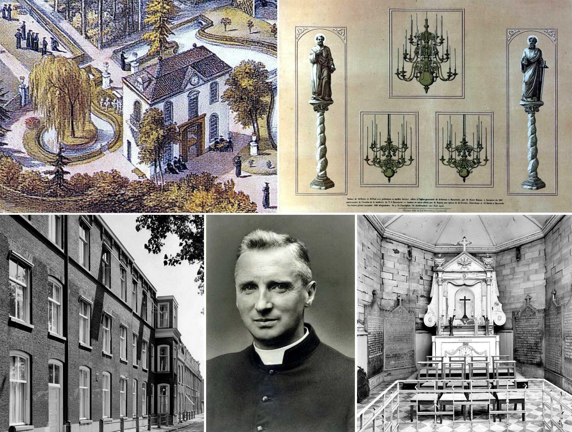 Collage van afbeeldingen die het godsdienstige leven van de familie Regout illustreren: jezuïeten in de tuin van villa Canne, geschenken van Petrus Regout aan Maastrichtse kerken, jezuïeteninternaat in Katwijk, Robert Regout s.j. en de grafkapel van de Regouts in Meerssen. Voor deze montage is gebruik gemaakt van rechtenvrije afbeeldingen op Wikimedia Commons: File:Villa_Canne_&_omgeving_(album_P_Regout,_1865)_(cropped2).jpg File:Schenkingen van Petrus Regout aan Maastrichtse kerken.jpg File:Voorgevel_-_Katwijk_aan_den_Rijn_-_20124206_-_RCE.jpg File:Prof dr Robert Regout (1896-1942).jpg File:INTERIEUR,_ALTAAR_-_Meerssen_-_20289390_-_RCE.jpg